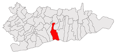 Categorie:Hărţi ale judeţului Călăraşi